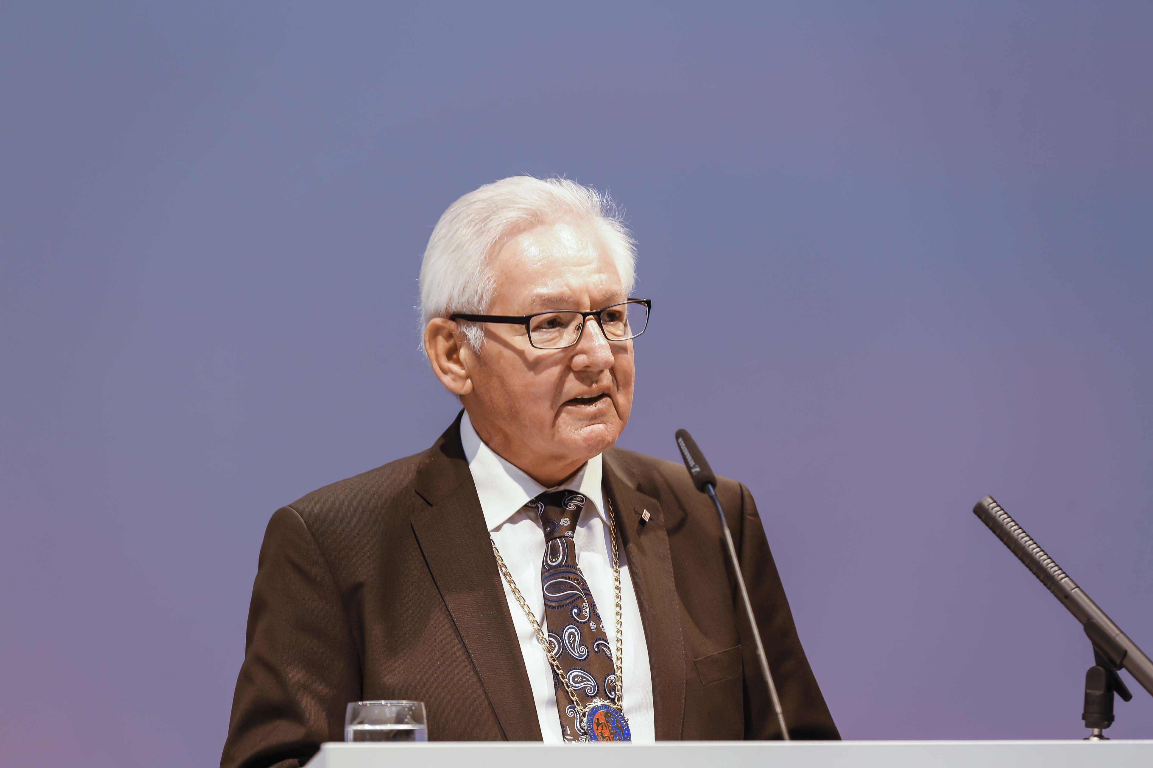 NFF-Eröffnung